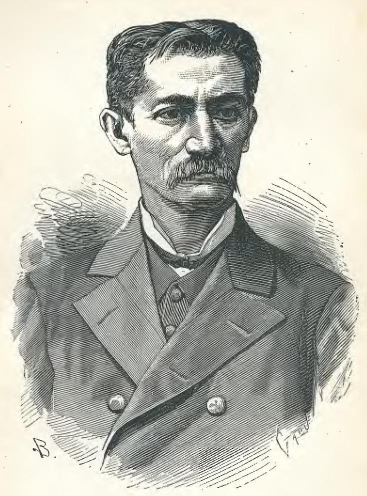 José Galvarino Riveros Cárdenas (Valdivia, Chile,1 2 de diciembre de 1829 – † Santiago de Chile, 11 de enero de 1892) fue un marino chileno, comandante de la escuadra chilena durante la Guerra del Pacífico.